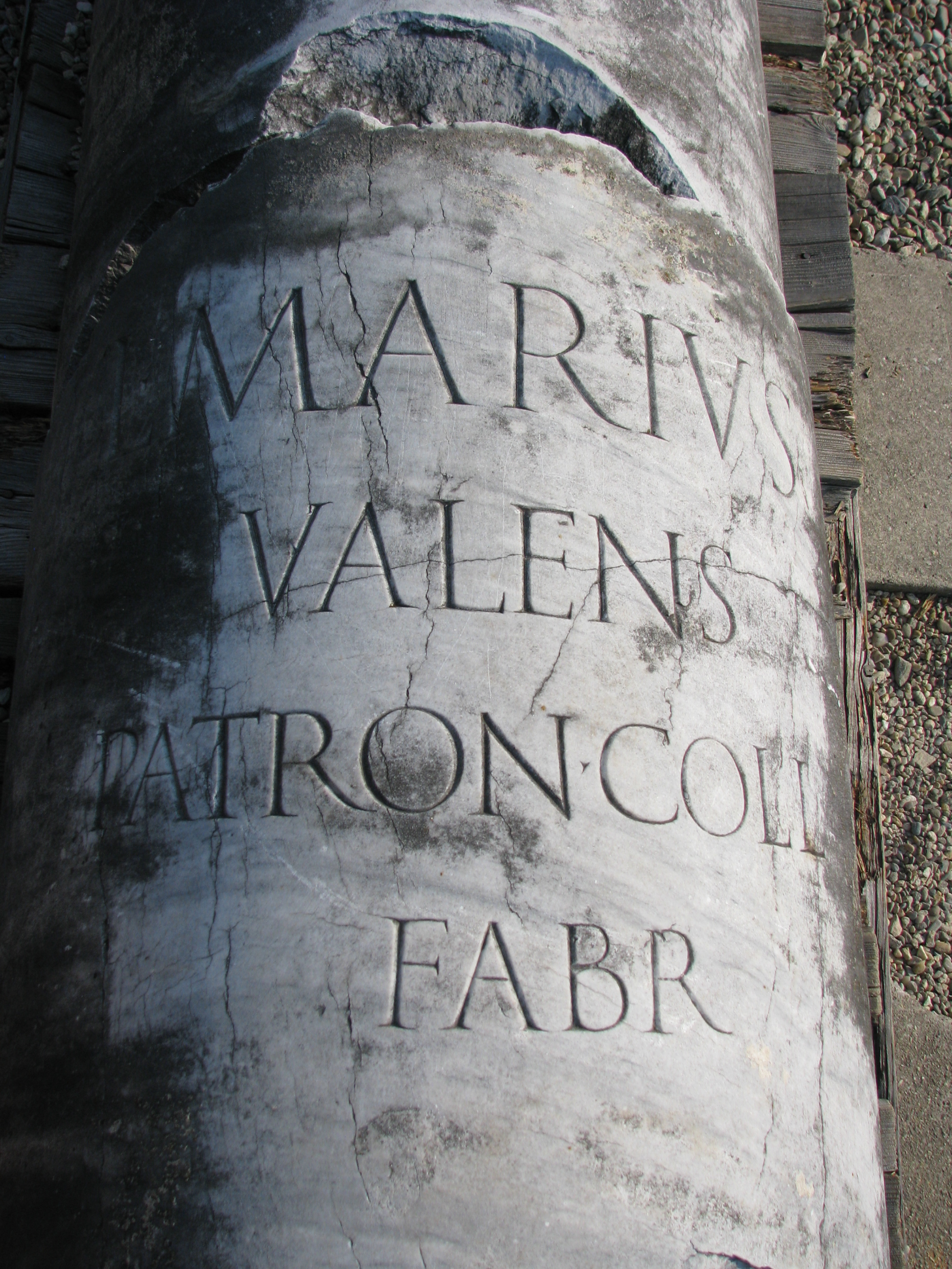 Columna honoraria romana procedente de Sarmizegetusa (Rumanía), correspondiente con AE 2003, 1524a: L(ucius) Marius/ Valens/ patron(us) coll(egii)/ fabr(um)